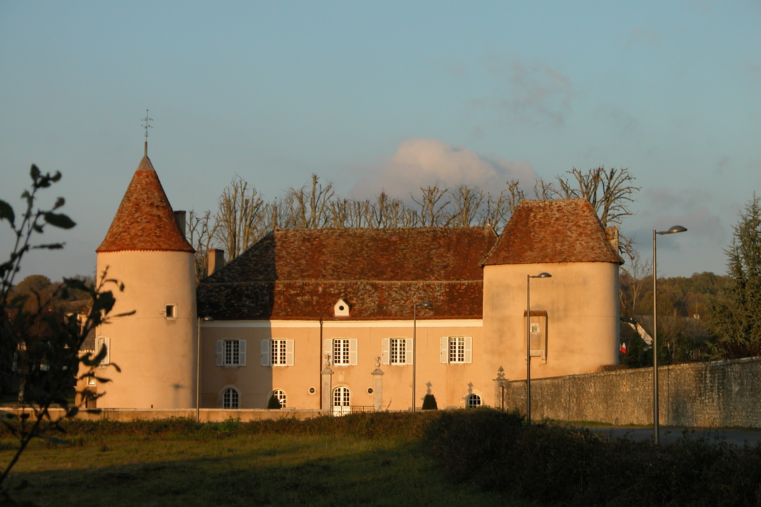 Vue générale du Château du Courbat - Mairie du Pêchereau (Indre)